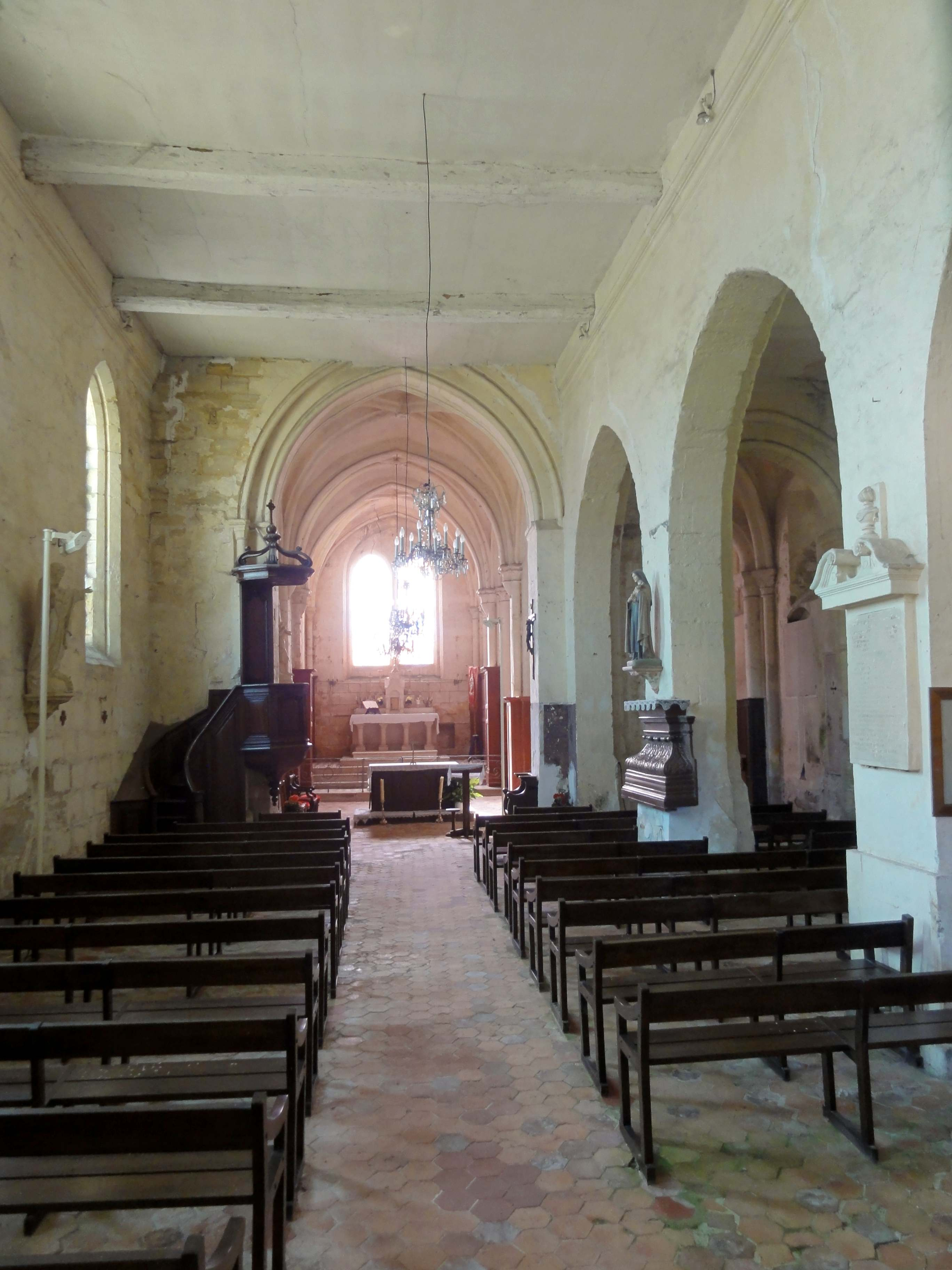 Intérieur de l'église - voir titre.